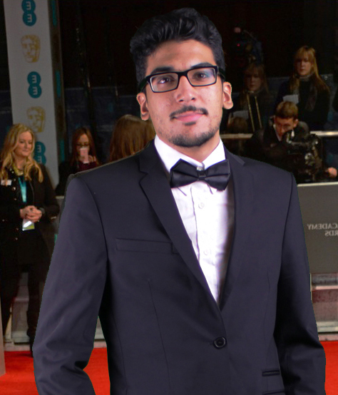 المخرج سلطان